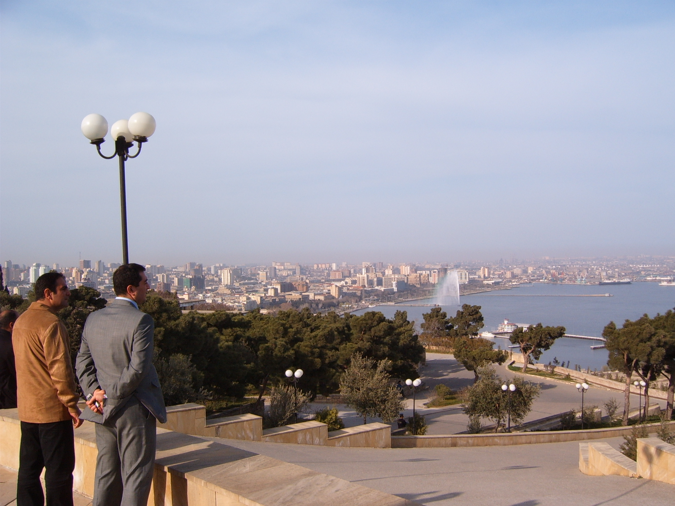 Baku SkylineSrpski: Pogled na Baku, Azerbejdžan